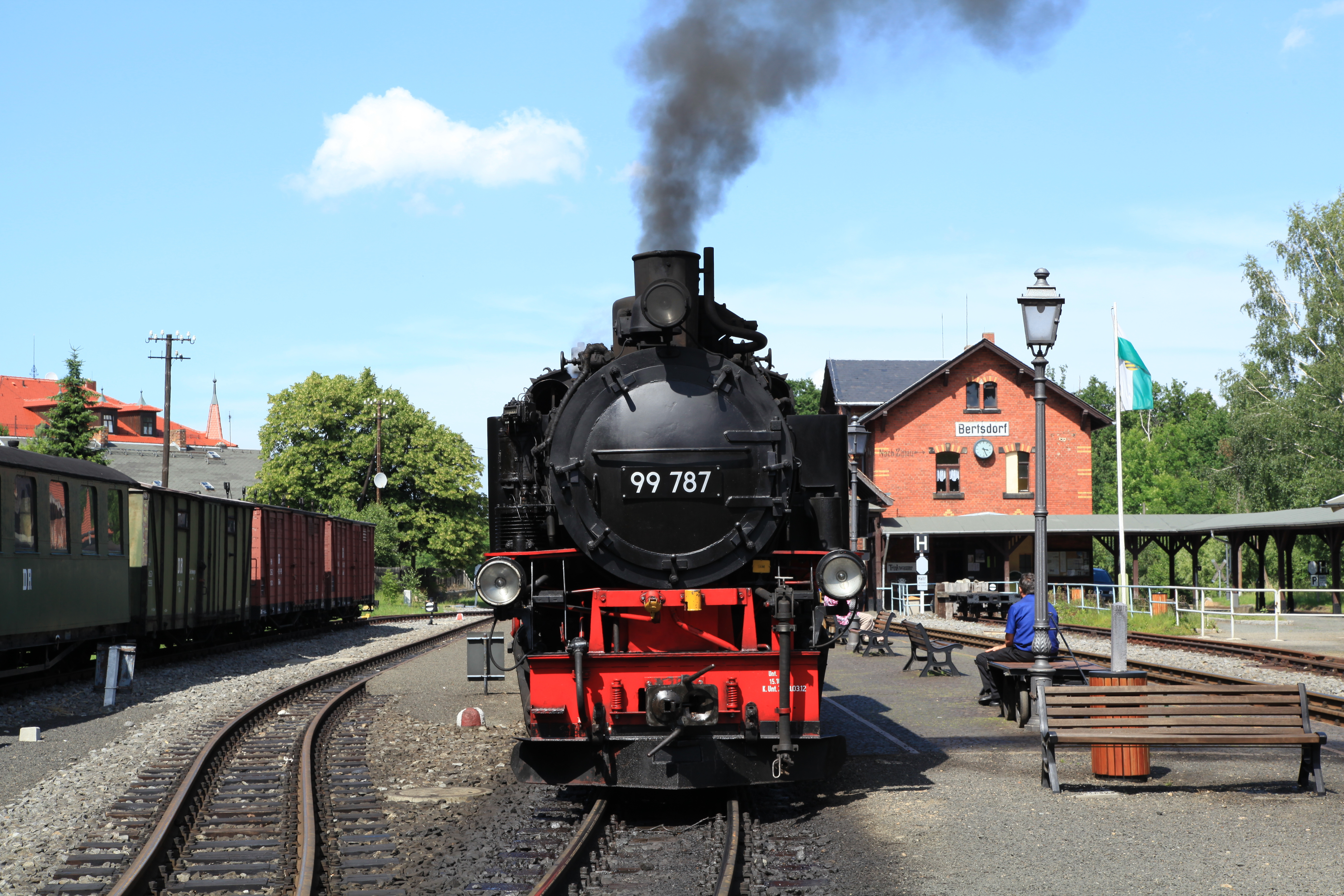 Zittauer Schmalspurbahn am Bahnhof Bertsdorf in Olbersdorf